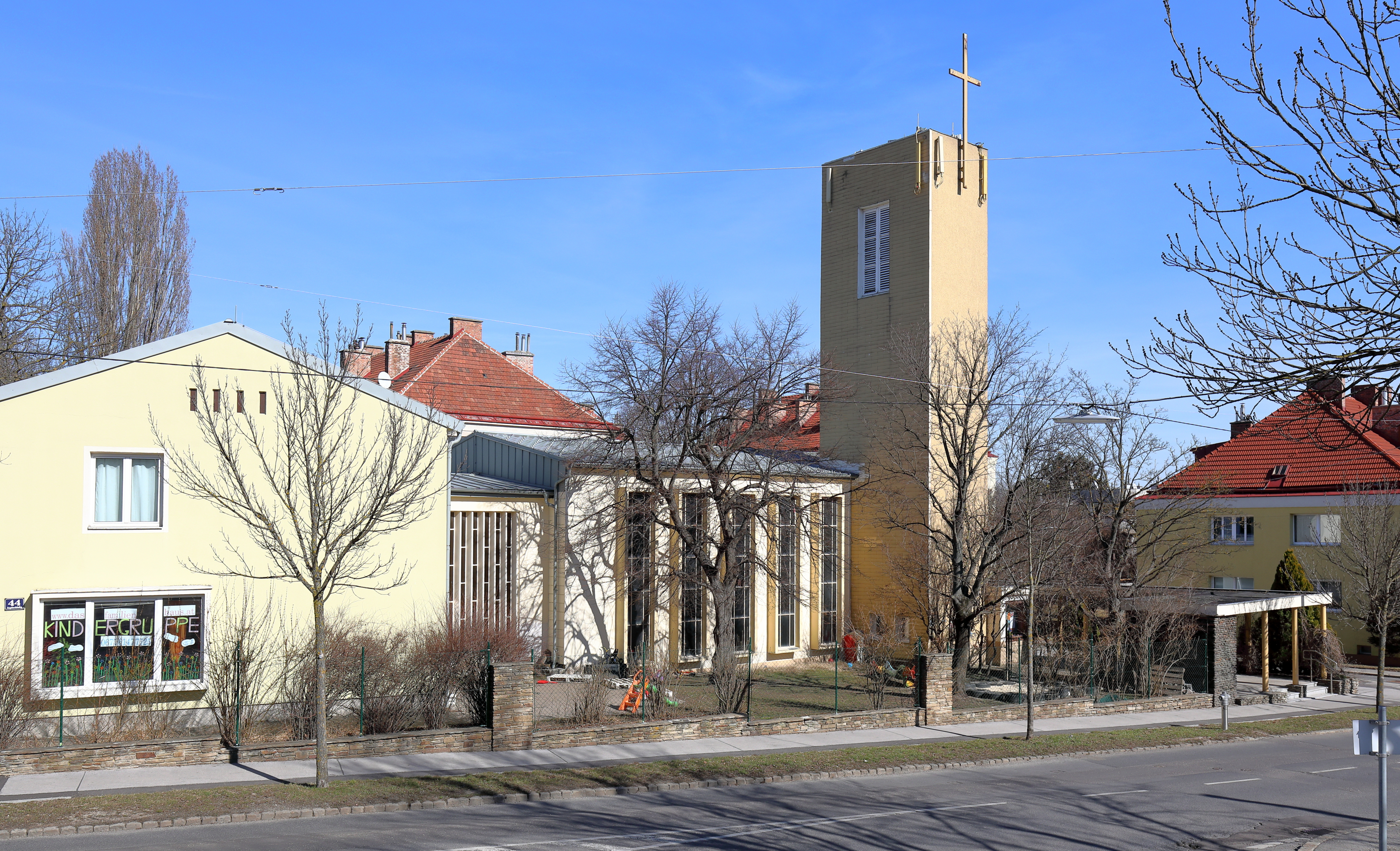 Die Evangelische Friedenskirche in Lainz im 13. Wiener Bezirk Hietzing.Das Pfarrzentrum mit Kirche, Pfarrhaus und Gemeindesaal wurde nach Plänen des Architekten Rudolf Angelides von 1957 bis 1960 errichtet. Die Weihe der Kirche erfolgte am 27. November 1960.